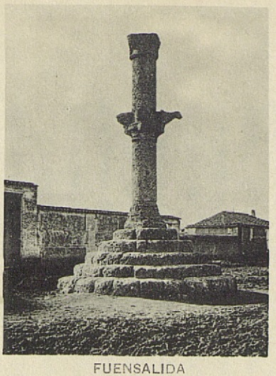 Castillo de Fuensalida